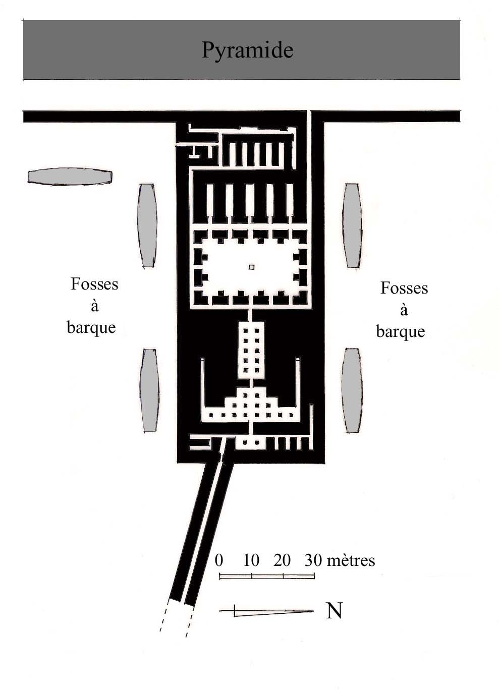 Temple funéraire de la pyramide de Khephren